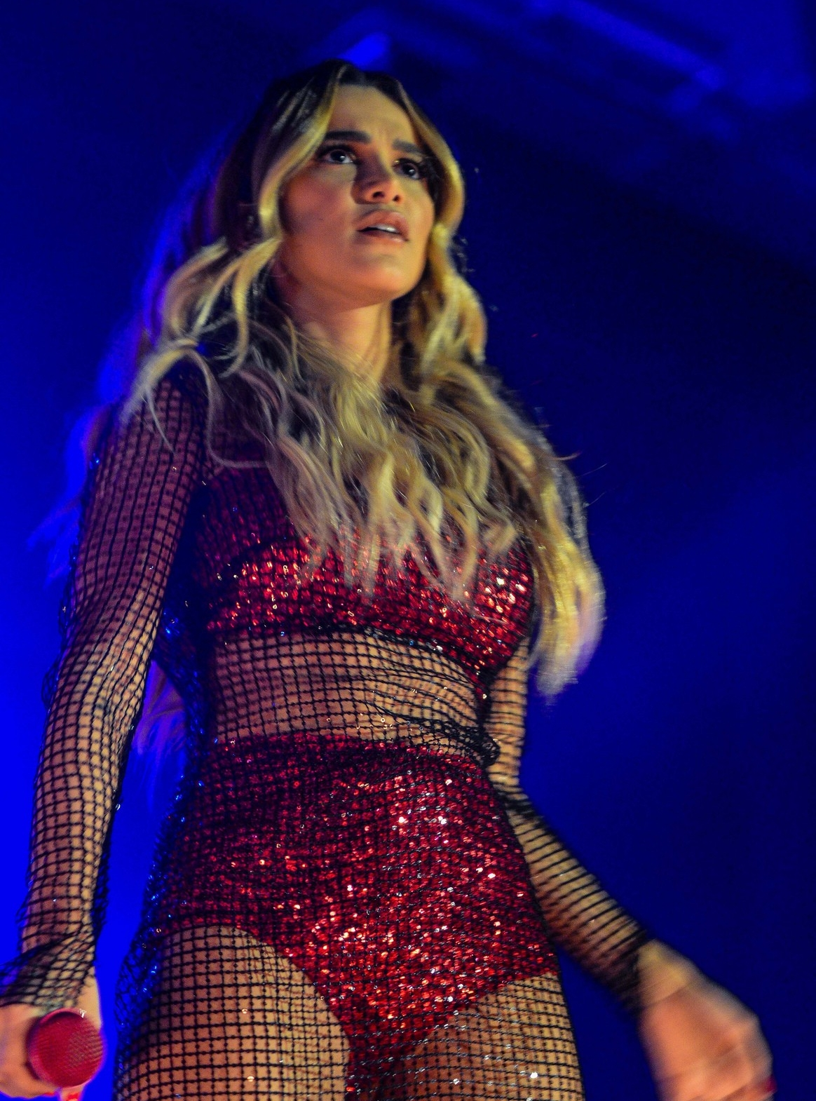 Manu no Tom Brasil